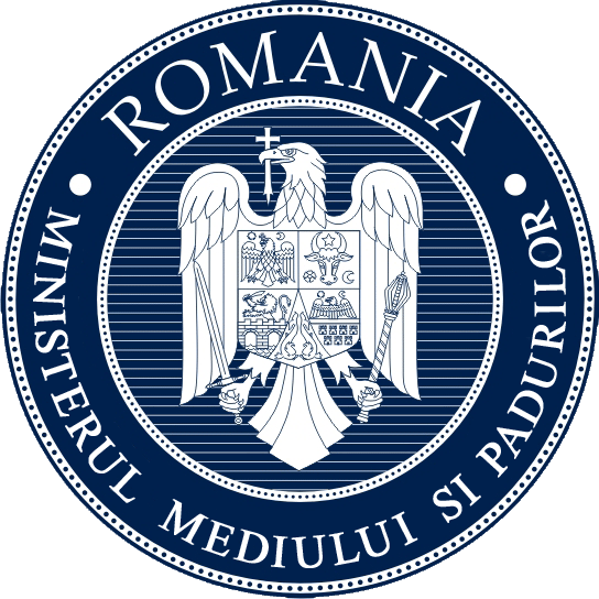 Logo-ul oficial al Ministerului.